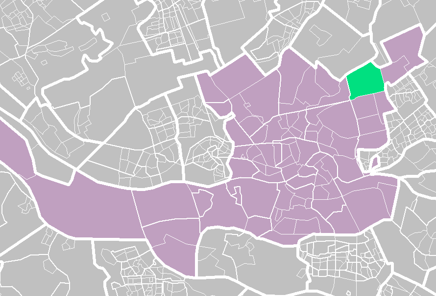 Rotterdam districts/neighboorhoods